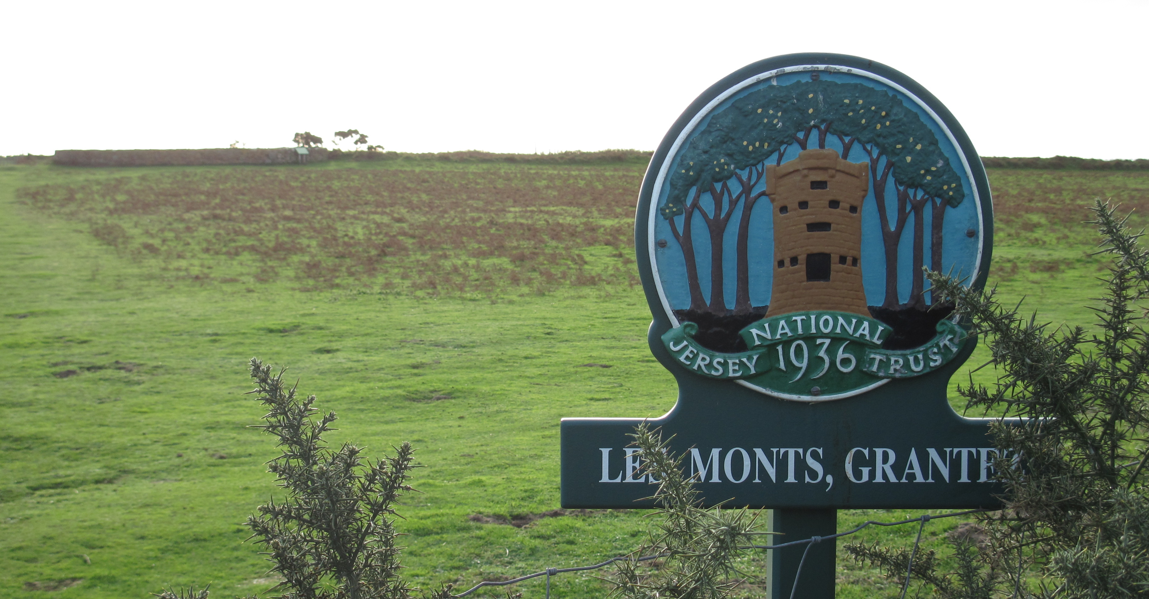 Nrf: Pouquelaye des Monts, Grantez, Saint Ouën, Jèrri